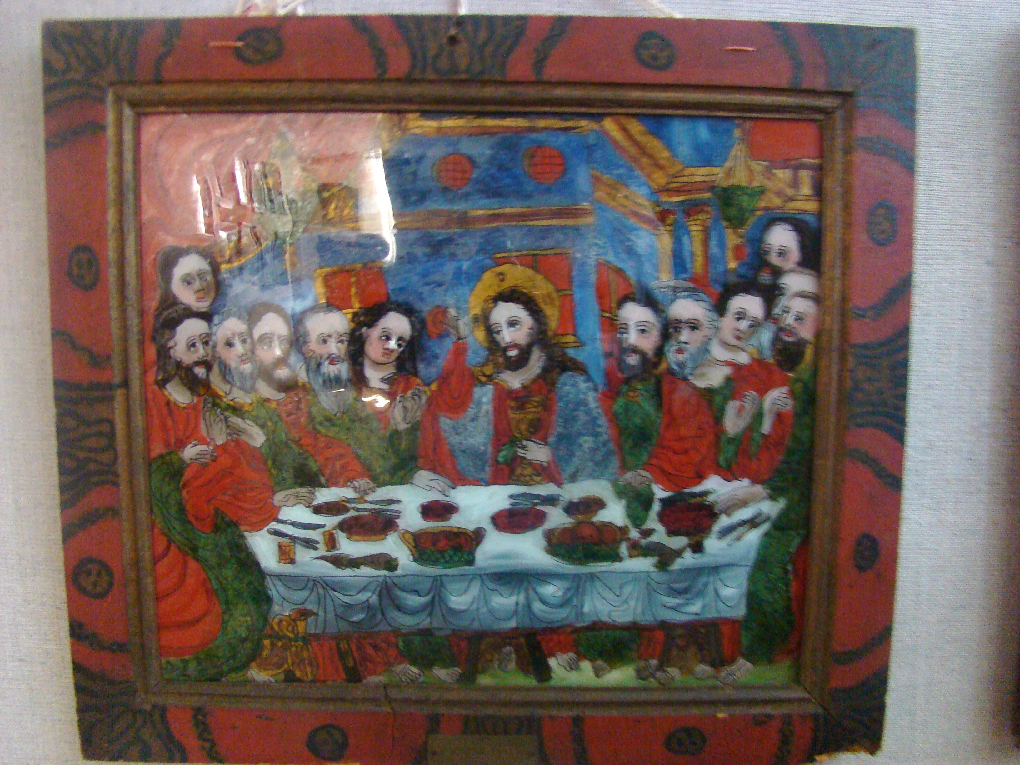 Muzeul de icoane pe sticlă „Pr.Zosim Oancea” din Sibiel